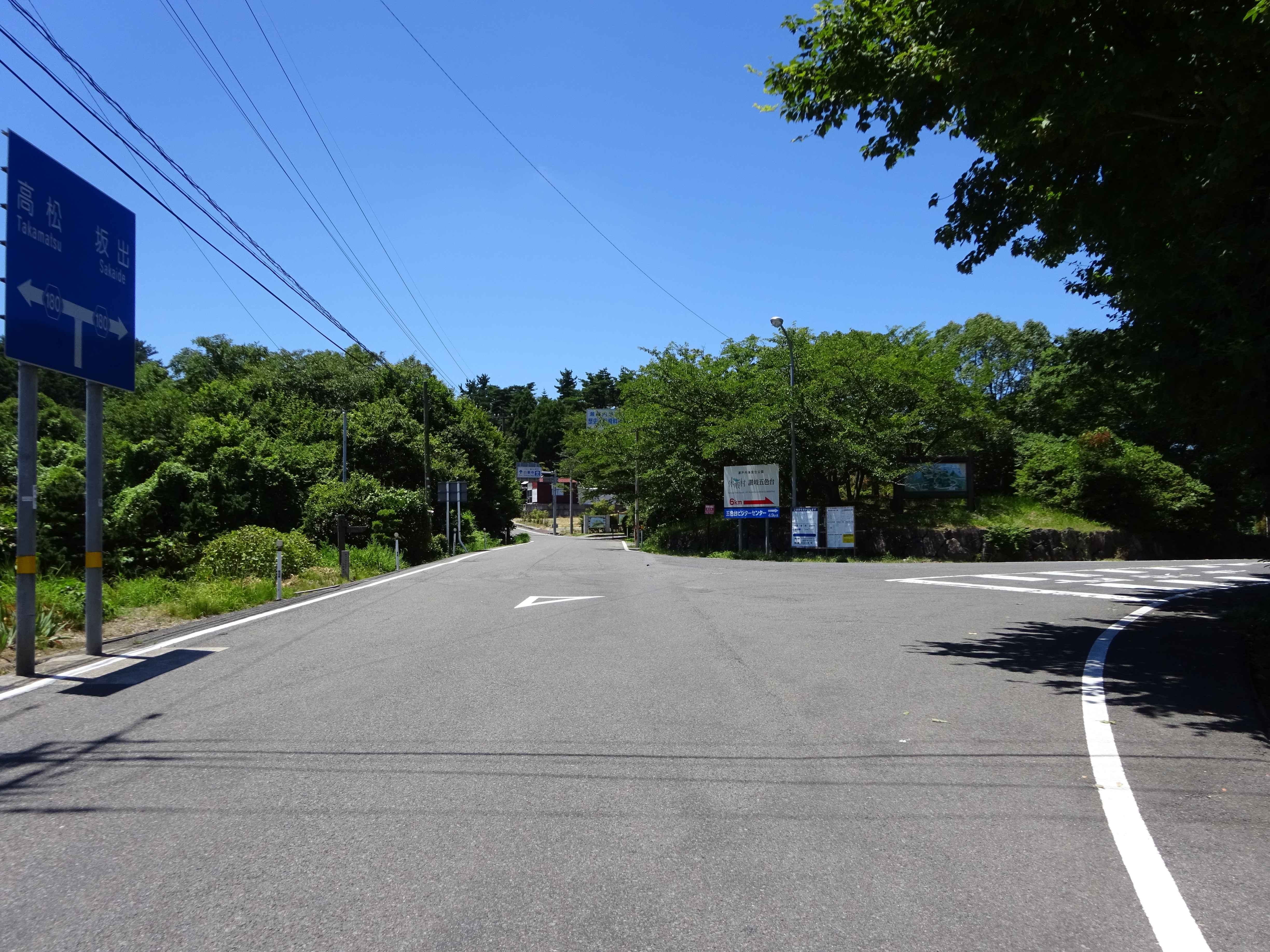 五色台スカイラインの起点三差路（右側が進入口）。七月下旬。